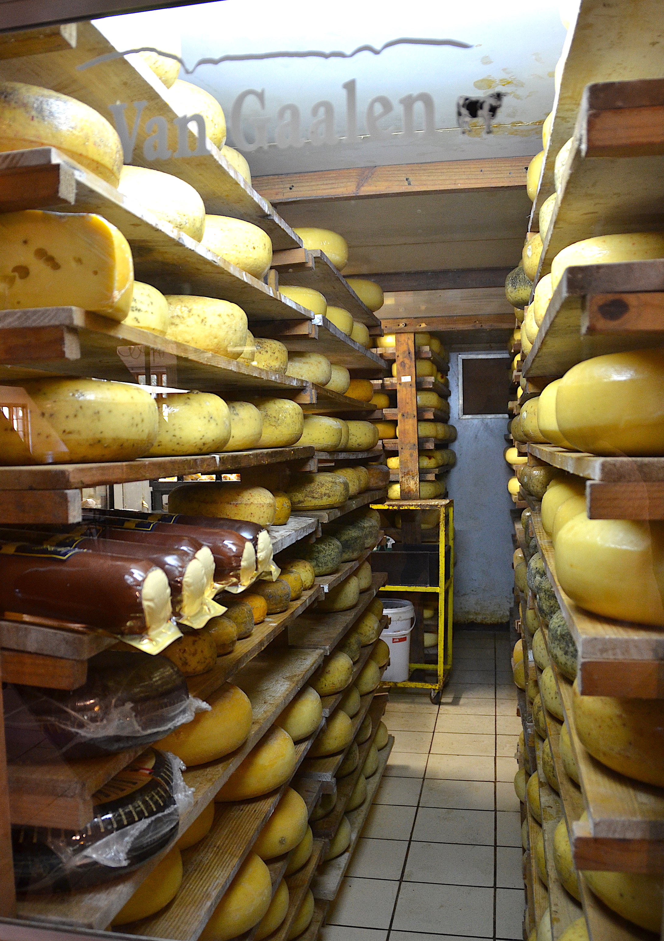 Van Gaalen Käsekeller in Südafrika